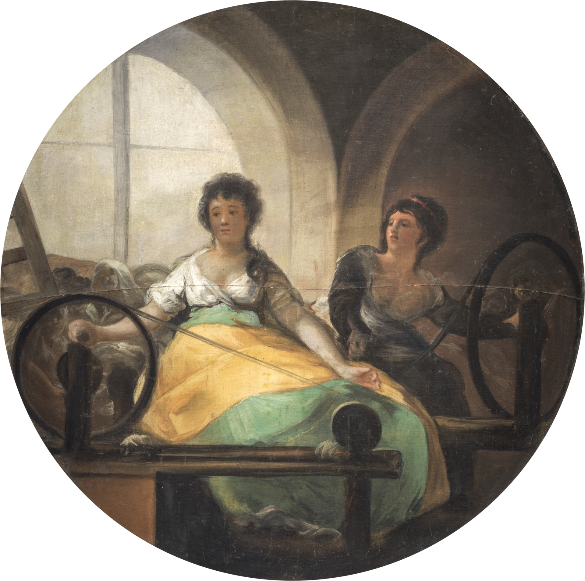 Alegoría de la Industria Cronología. Temple sobre lienzo. Diámetro 227 cm